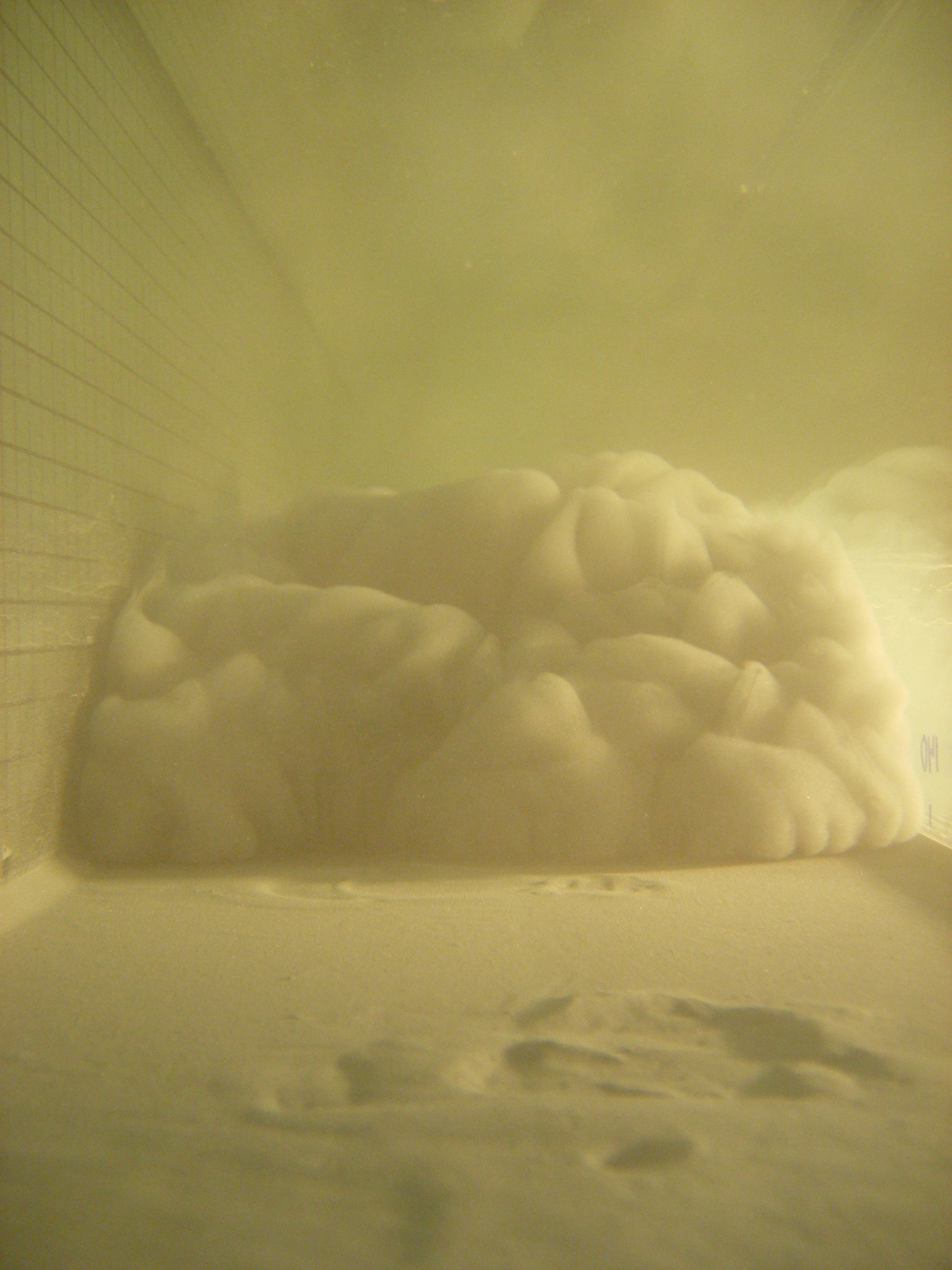 Modellhafte Darstellung eines Suspensionsstroms (Milch in Wasser)